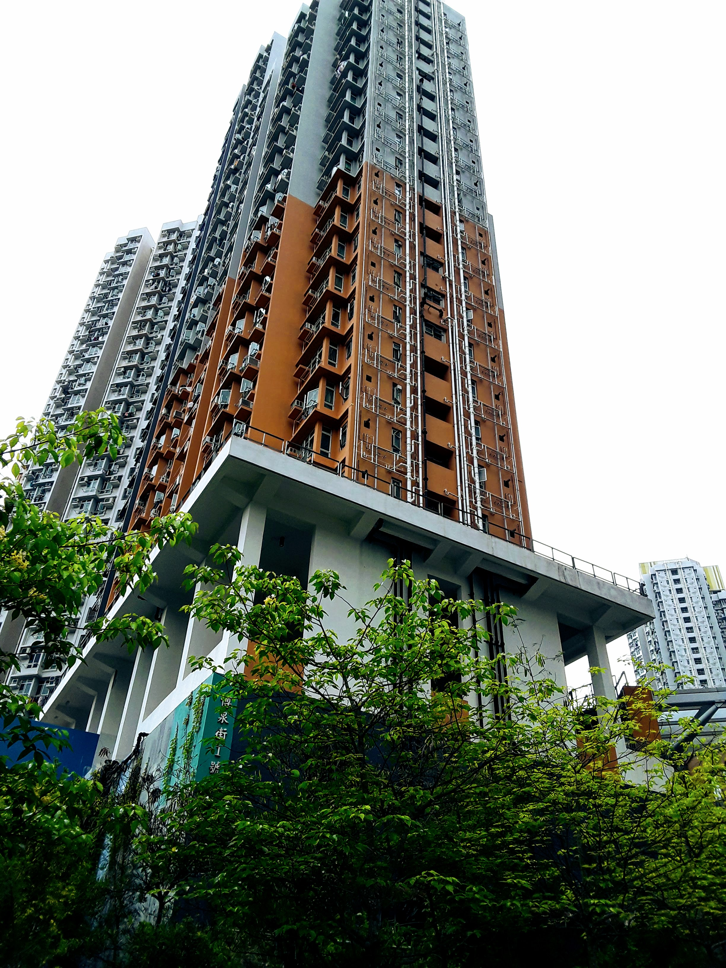 水泉澳邨的門牌號碼